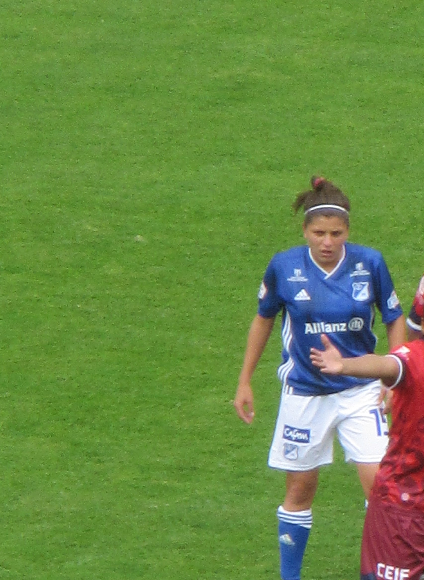 Mariana Pion jugando con Millonarios FC en 2019 (21/07/2019)